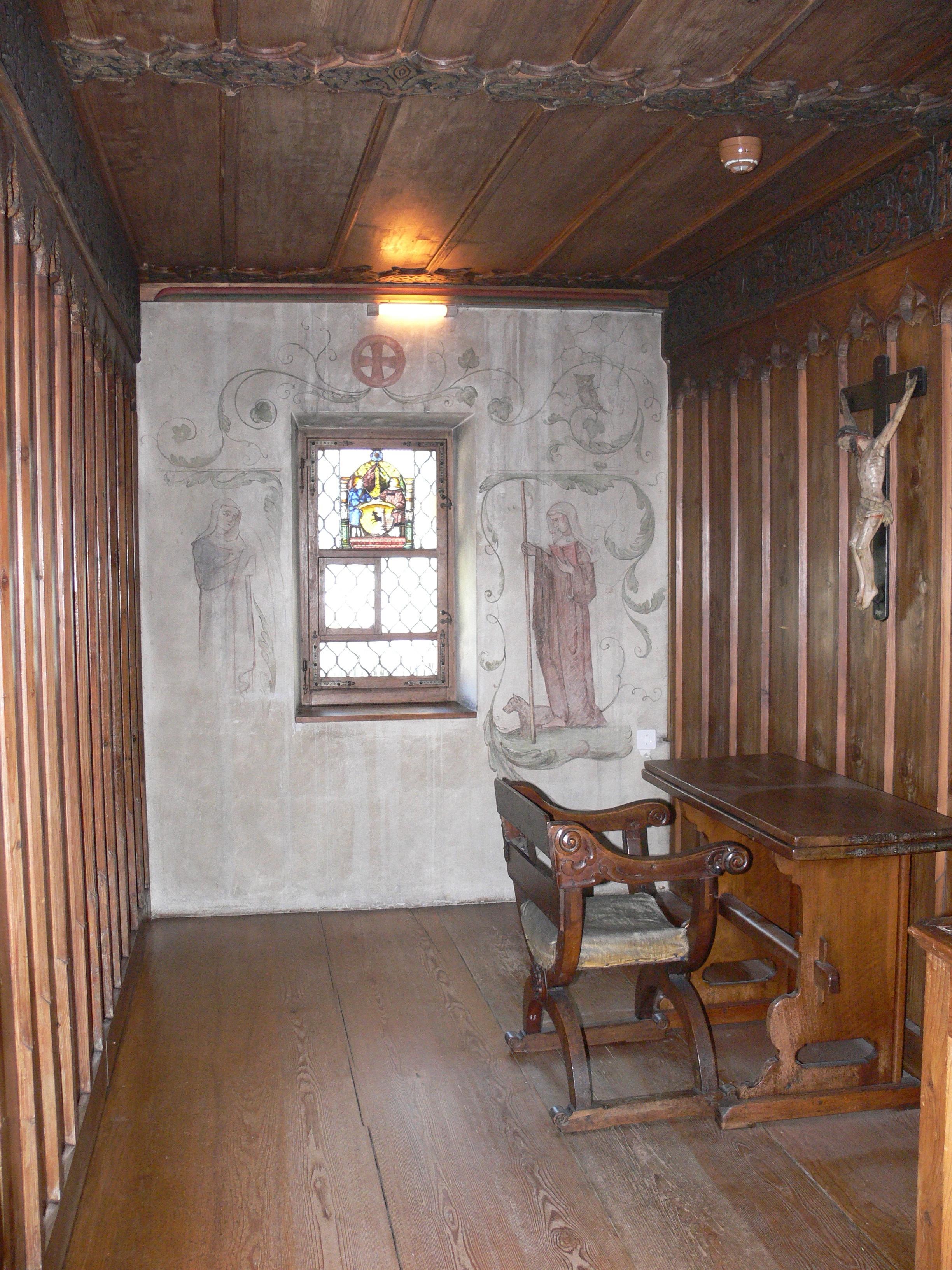 Schaffhausen, Museum zu Allerheiligen Spätgotische Zelle aus dem ehemaligen St.-Agnesen-Frauenkloster in Schaffhausen (mit Deckenschnitzereifries der Arma Christi in Form des Wortes "Jesus")